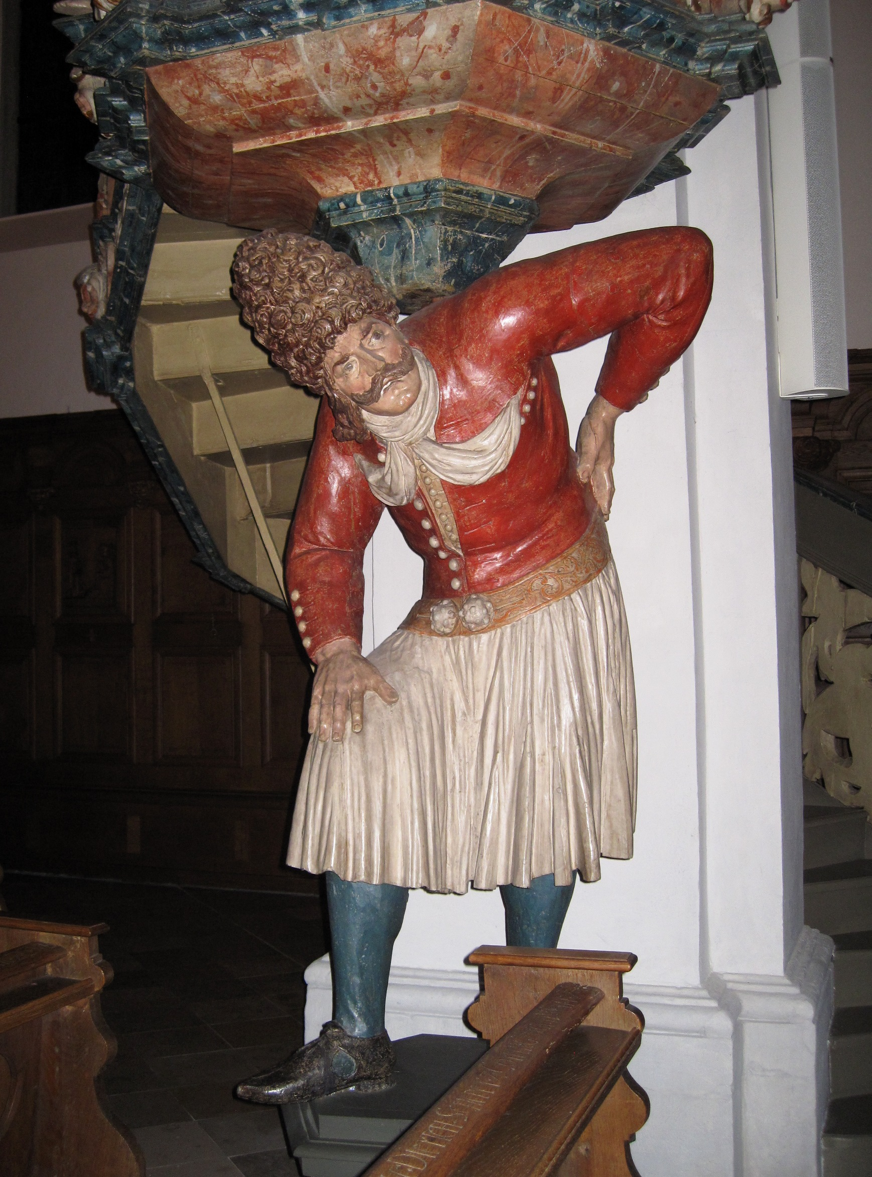 Pfarrkirche St. Pankratius in Körbecke. Tragefigur (Tanchelm) in vermutlich polnischer Tracht.